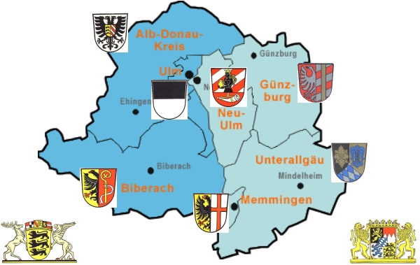 Regionkarte mit Stadt/Landkreis/Landeswappen